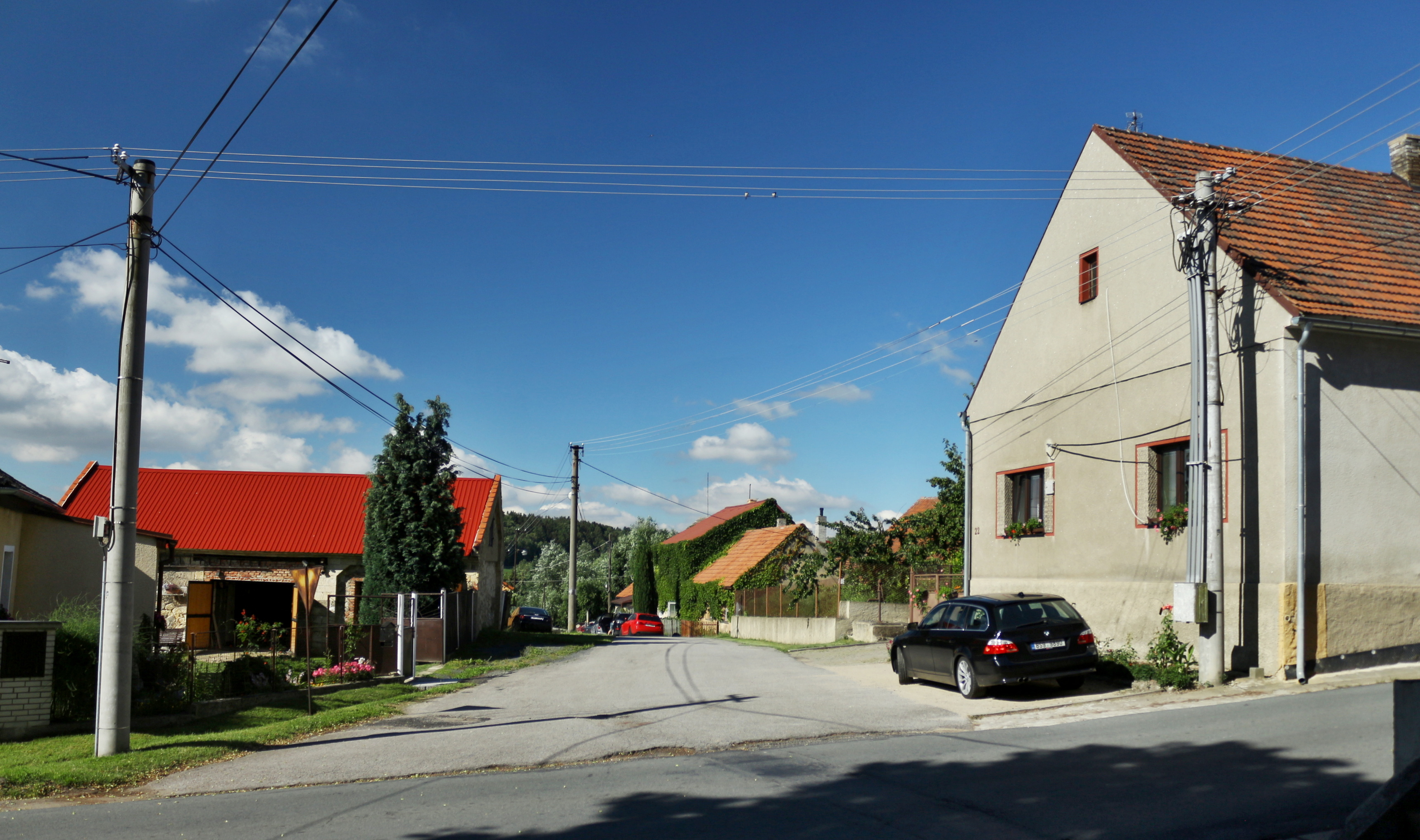 Kroučová